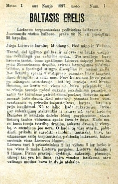 Jurgio Bielinio "Baltasis Erelis"